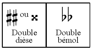 Auteur : Yves30 ( Division des altérations doubles en altérations usuelles et altérations désuètes (celles composées d'un bécarre). Cette image correspond à la première catégorie.